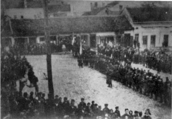 Srpskohrvatski / српскохрватски: Smotra Užičkog partizanskog odreda, pred komandantom Dušanom Jerkovićem, u oslobođenom Užicu 1941.